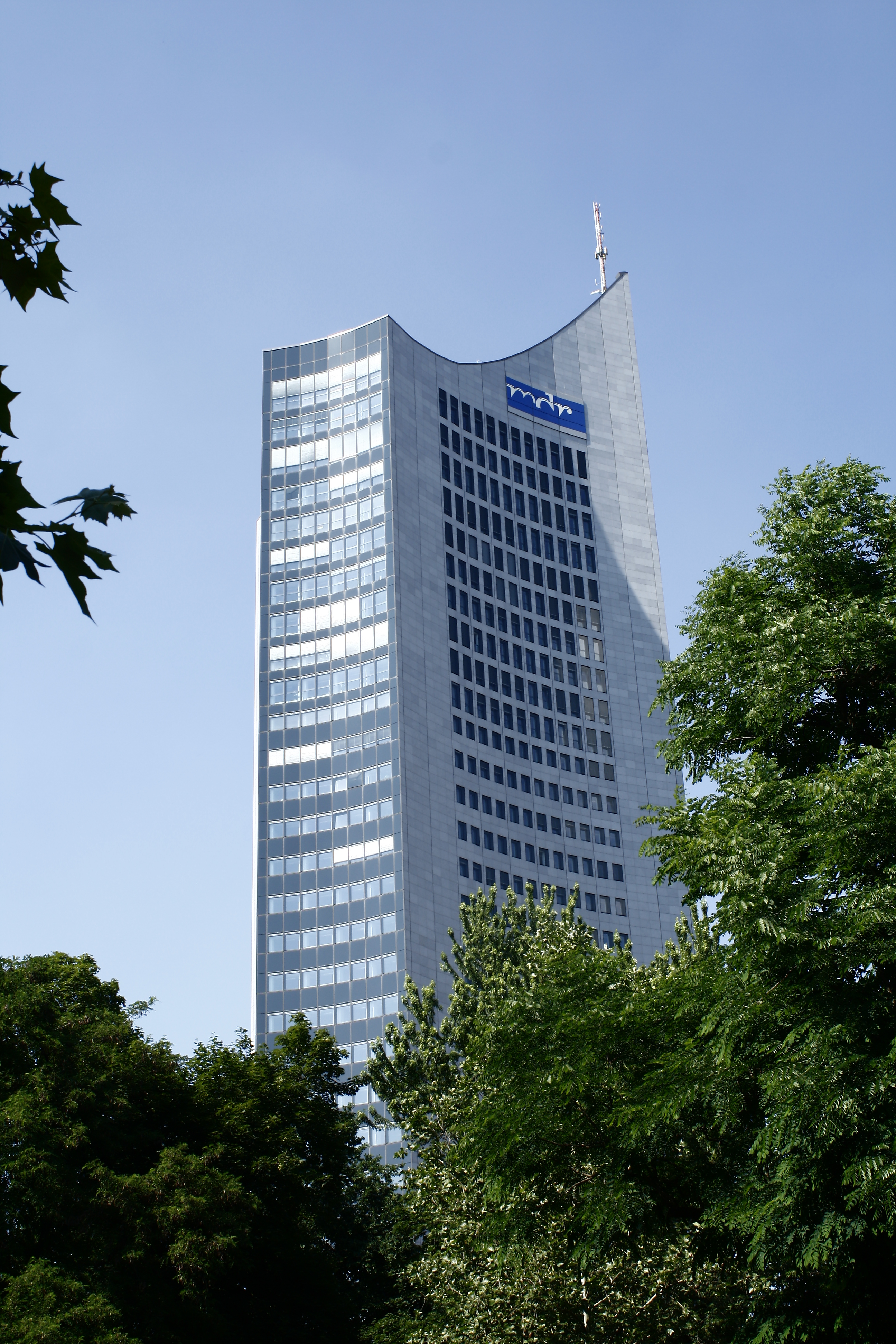 Das MDR-Hochhaus in Leipzig. The City Tower at Leipzig